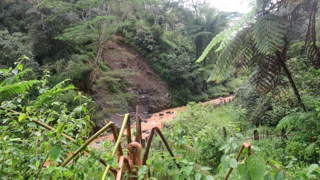 Leguimea